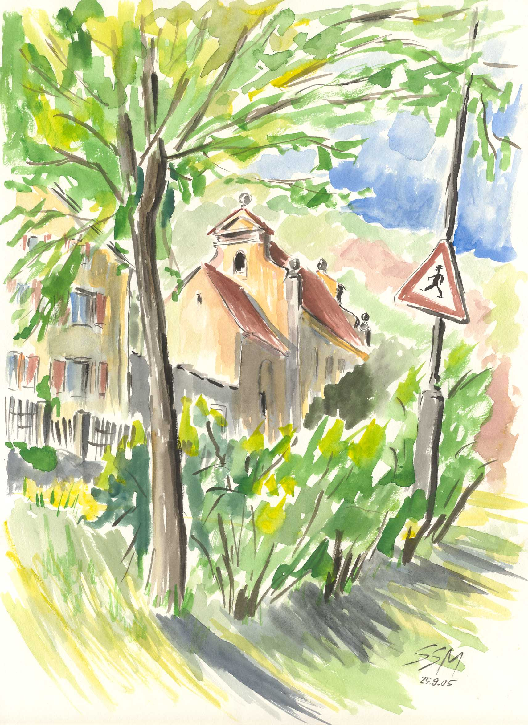 Eichstätt, Siechhof, Aquarell von Siegfried Schieweck-Mauk (Eichstätt), Originalgröße 40 x 28 cm